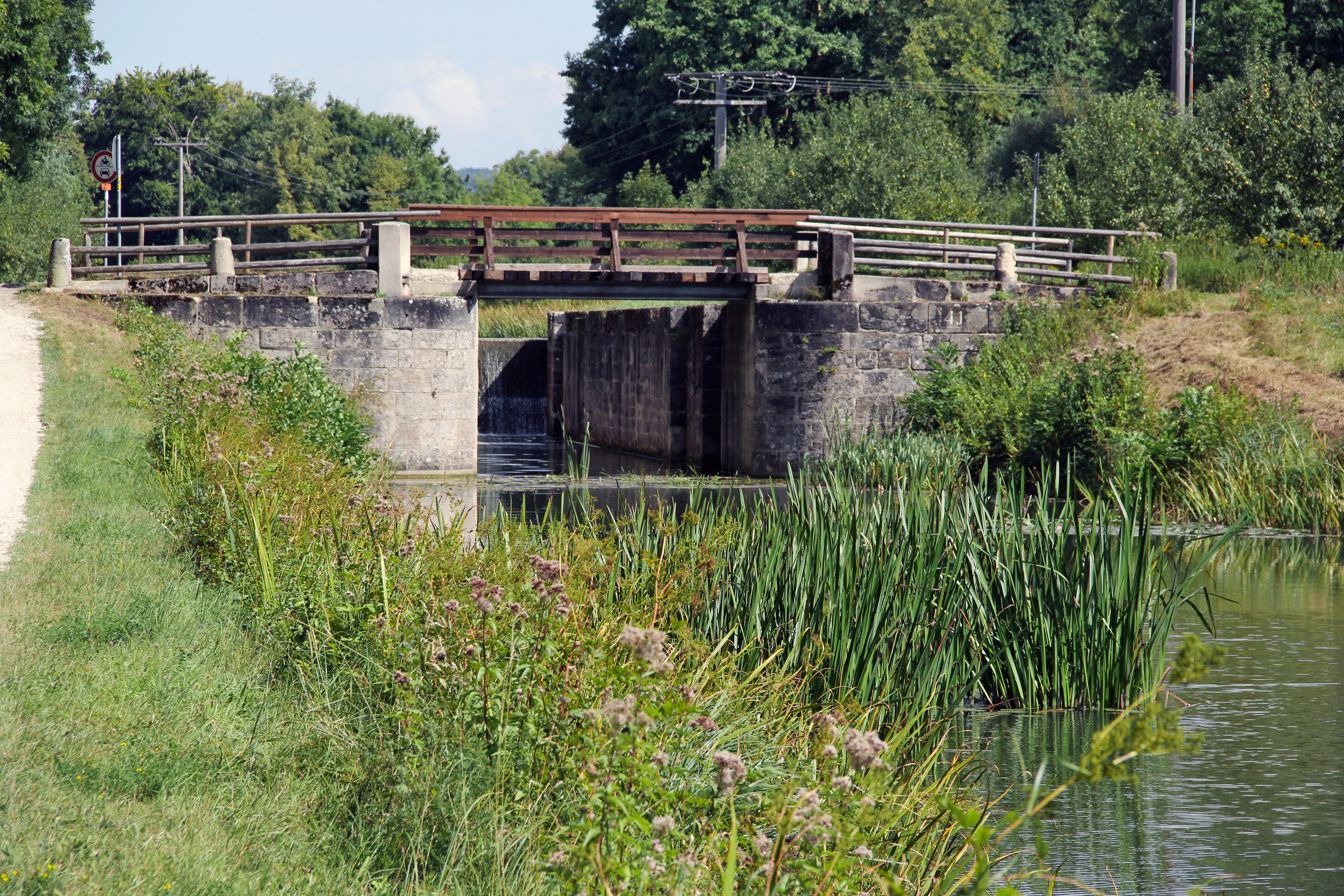 Schleuse 41, Ludwig-Donau-Main-Kanal